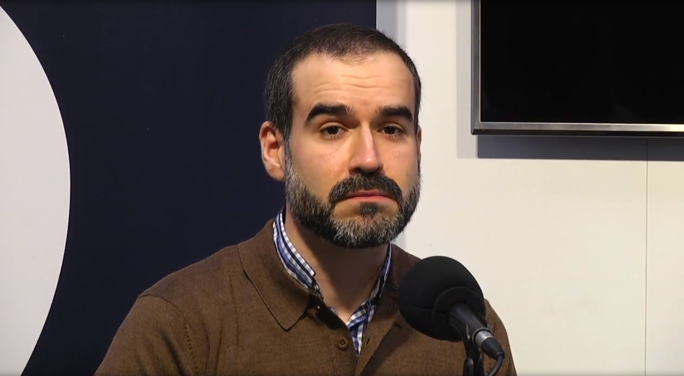 La Secretaria General de los Socialistas Vascos, Idoia Mendia, ha advertido a "las nuevas fuerzas que nacen en el espacio progresista" que "lean bien la lección del pasado" ahora que se cumplen 25 años de la convergencia del Partido Socialista y Euzkadiko Ezkerra y "tomen nota ante el futuro que se nos presenta" .